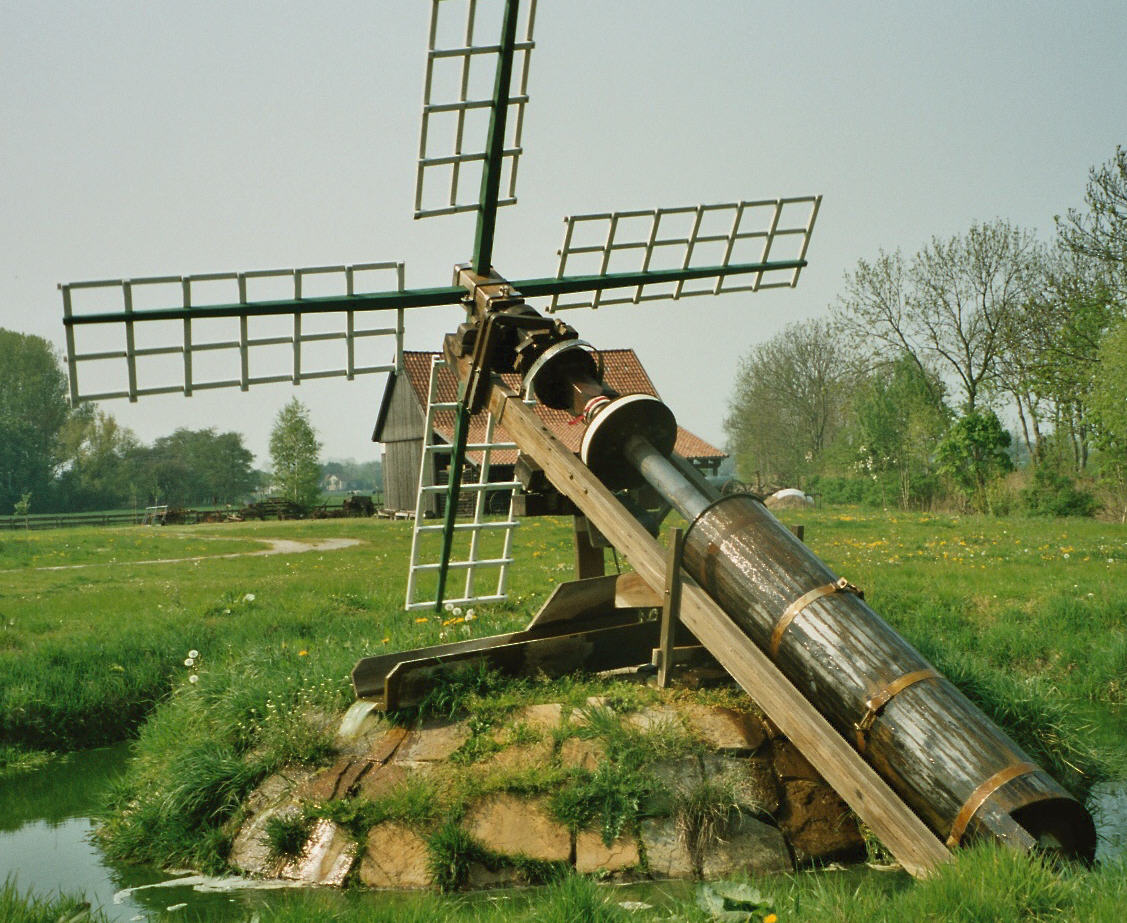 Fluttermühle bei der Moorseer Windmühle (Wesermarsch)